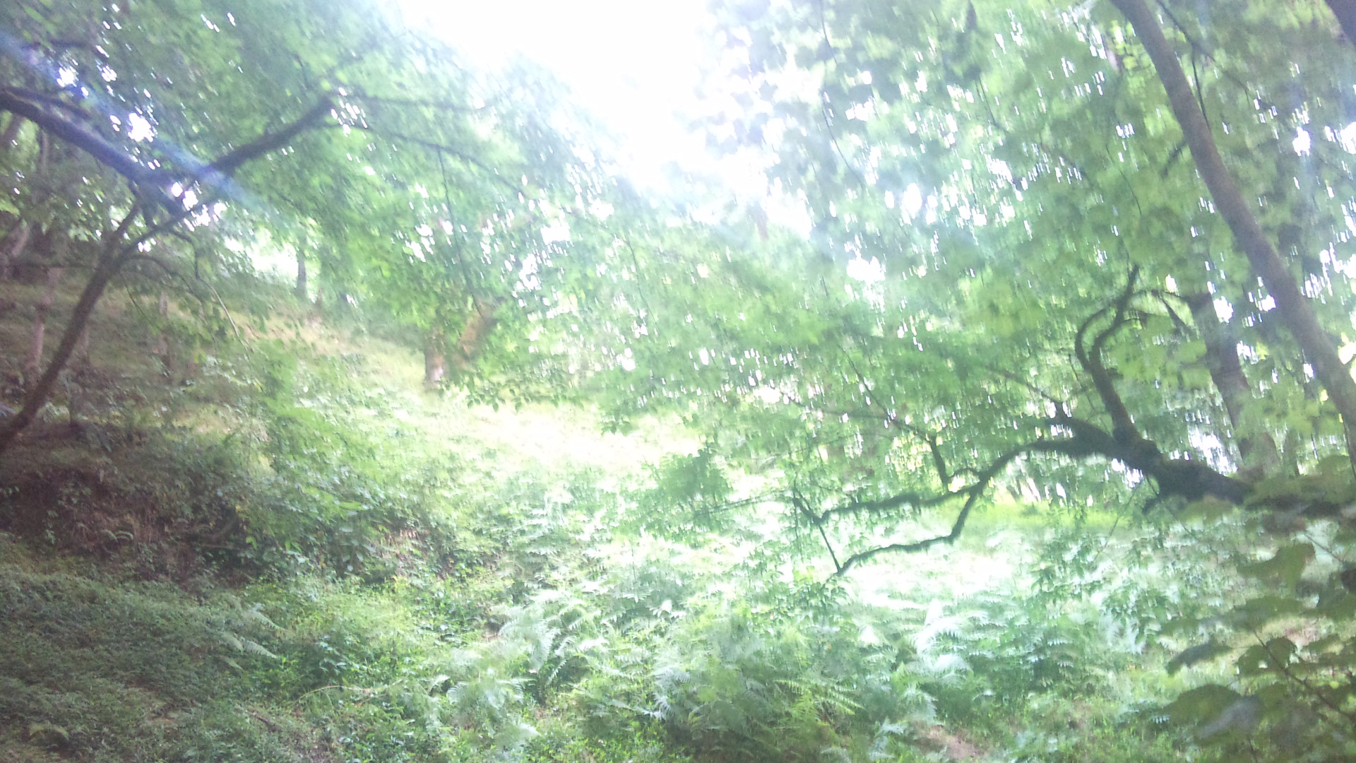 جنگل گیلان